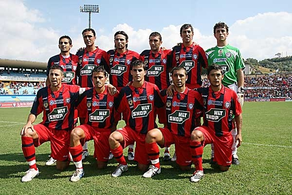 Cosenza Calcio 1914 2008-2009 (Cosenza vs Società Sportiva Barletta Calcio)